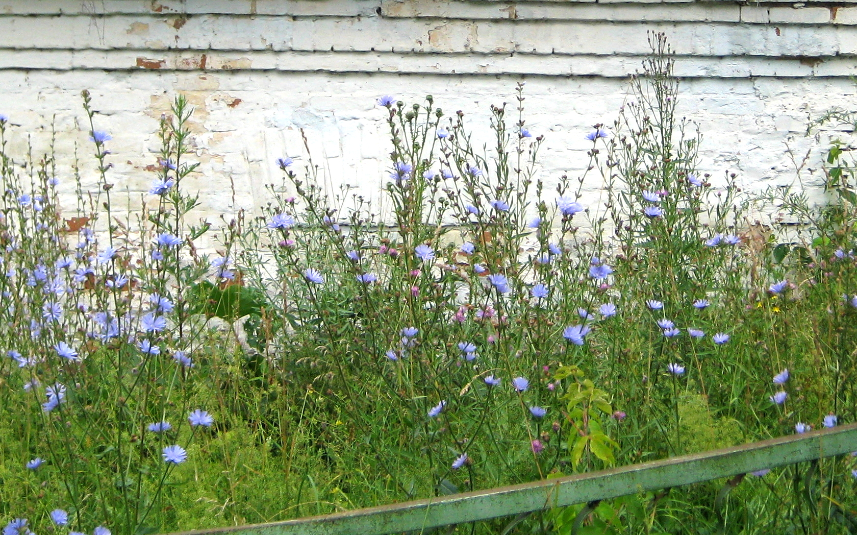 Цикорий в Тарусе